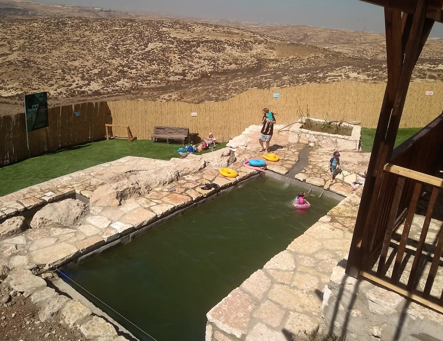 מעין עשהאל ע"ש סמ"ר אלמוג עשהאל שילוני הי"ד